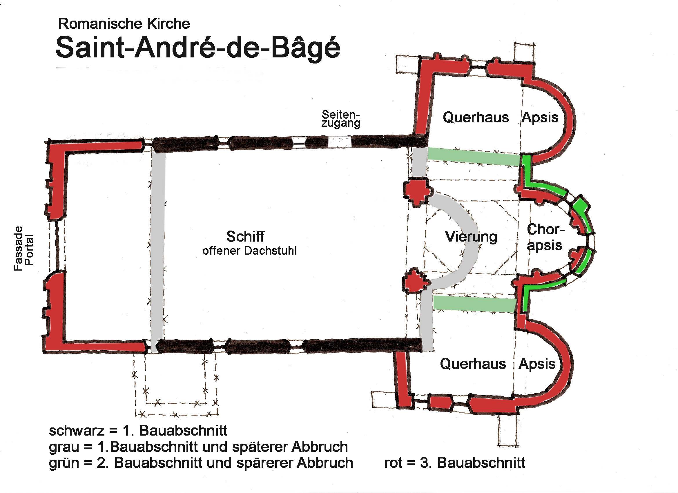 St.-André-de-Bâgé, Grundrissskizze